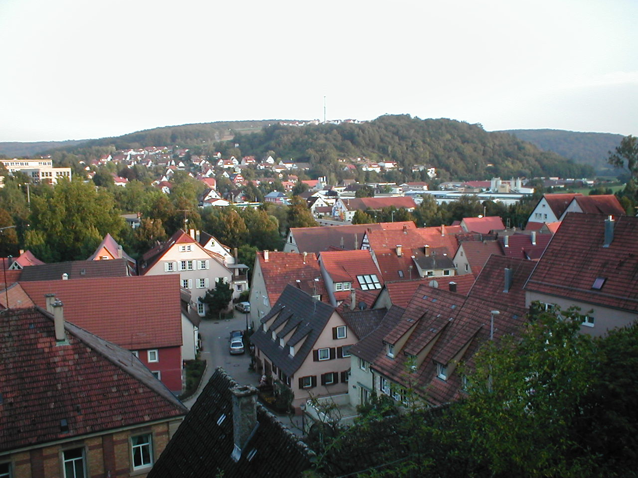 Blick auf Möckmühl von der Burg